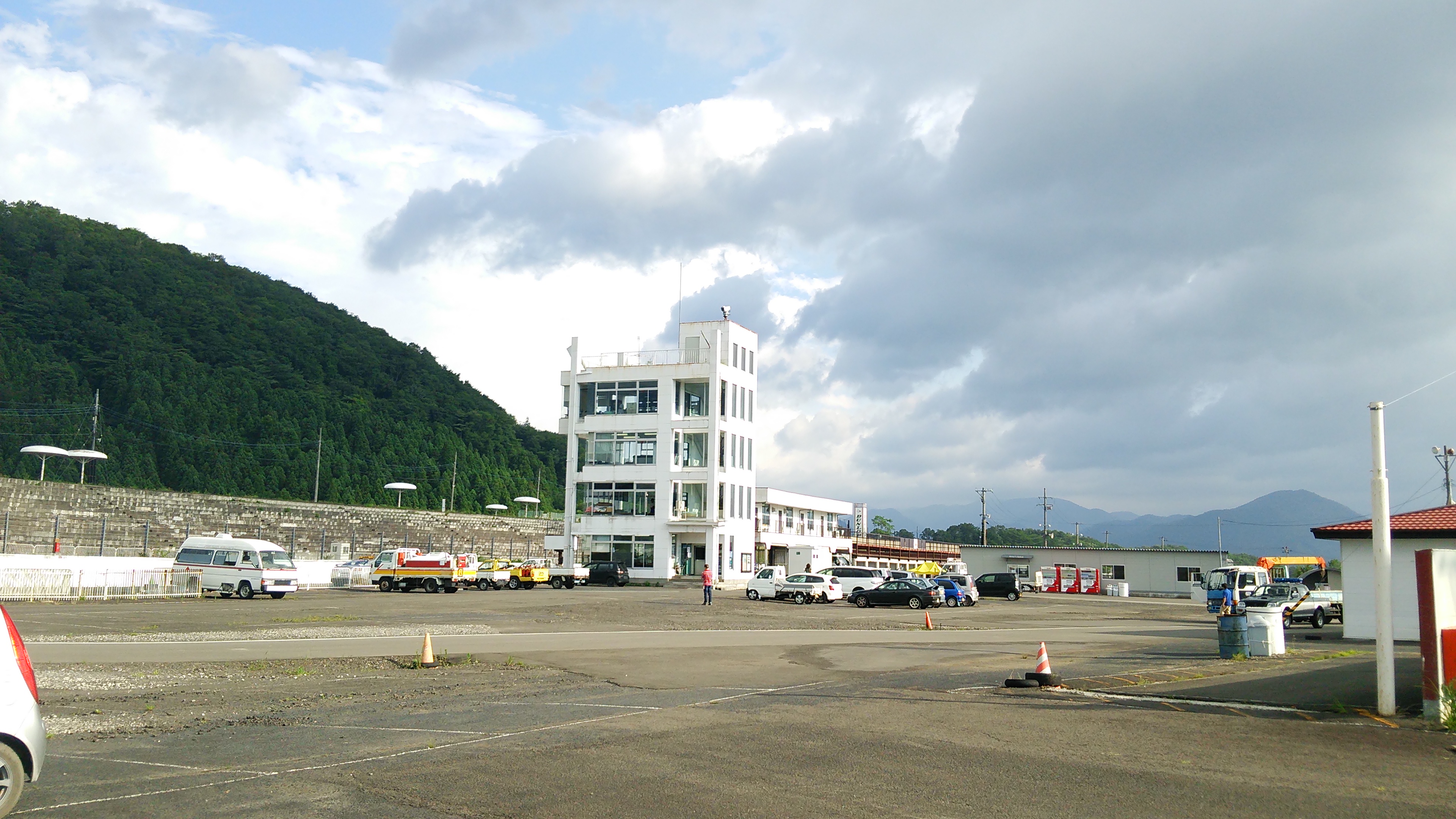 レースコースタワー